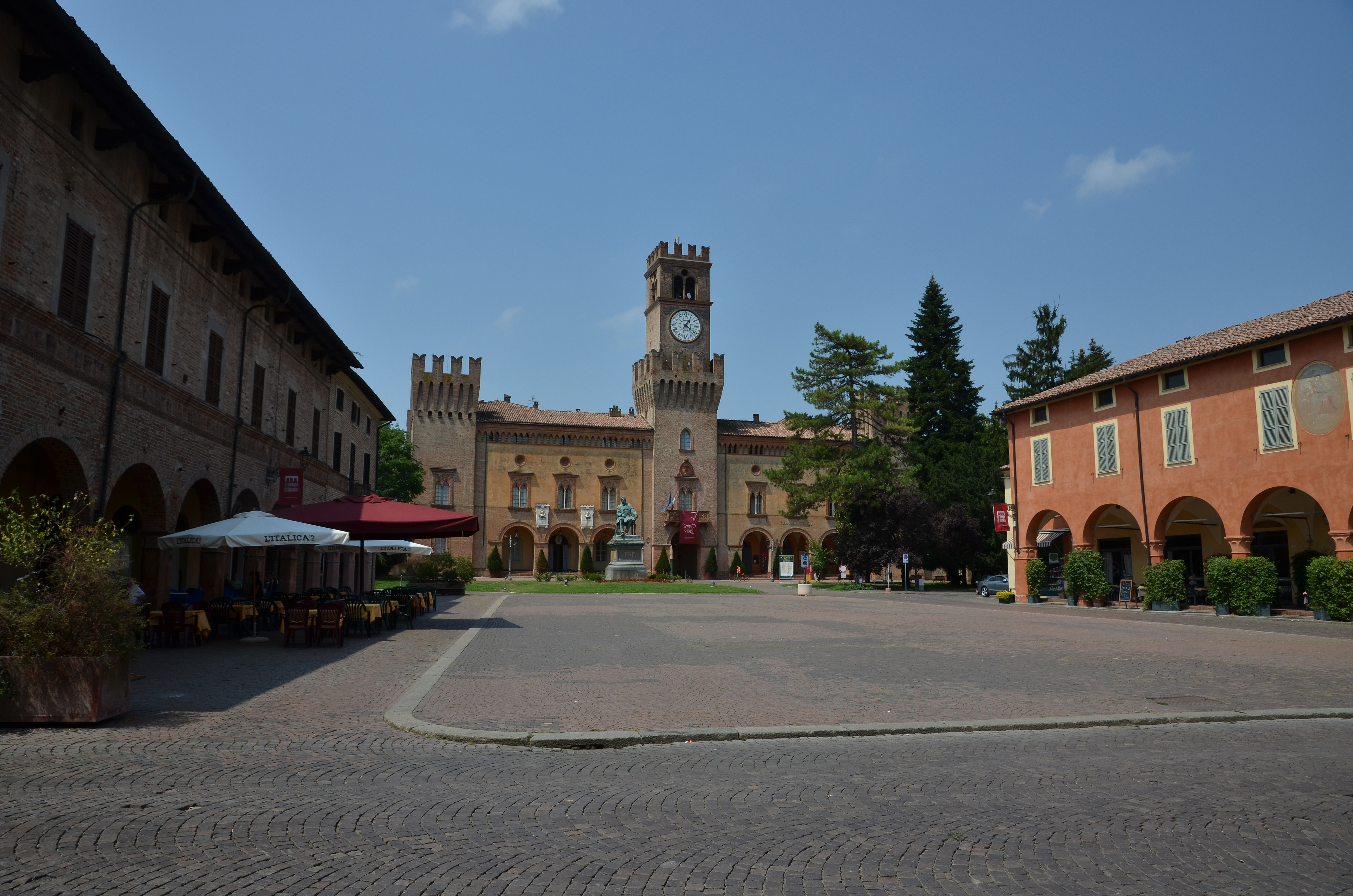 Busseto - Itálie